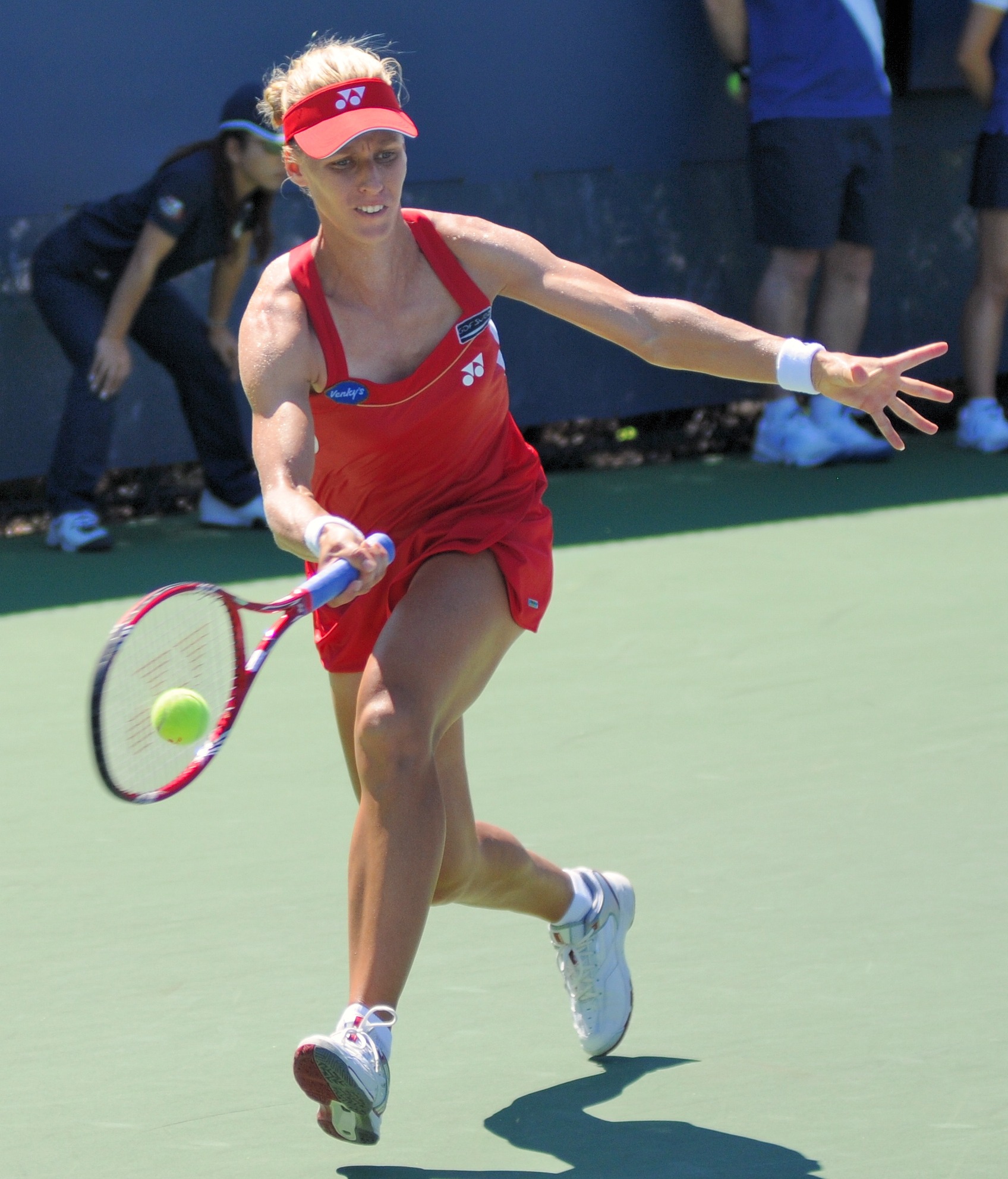 Elena Dementieva - US Open 2010